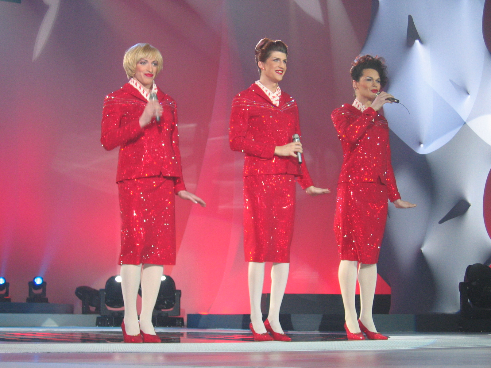 Sestre, slovenska zabavno glasbena vokalna skupina.